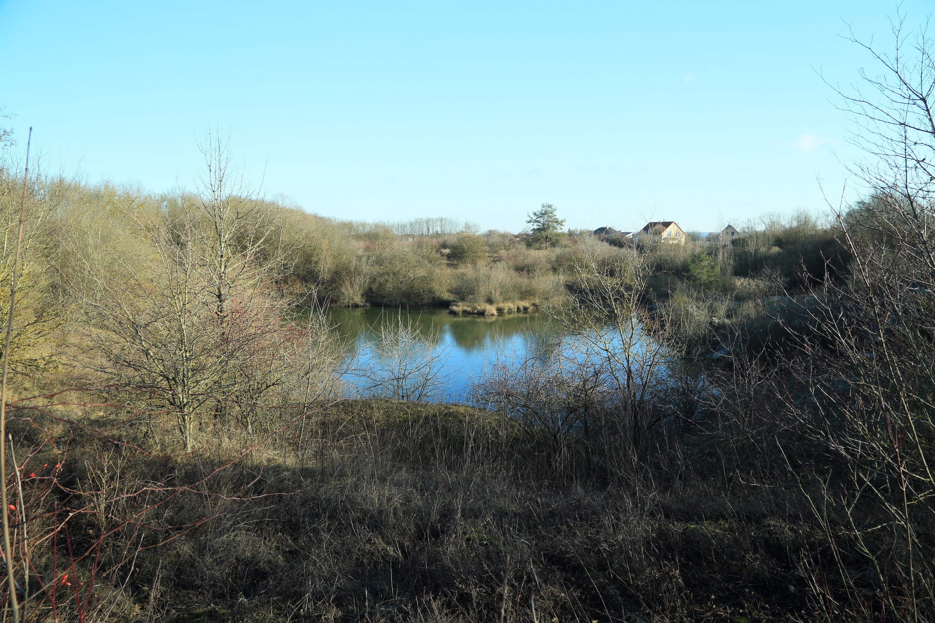 Ehemaliger Gipsbruch "Katzenloch" bei Bad Windsheim Geotop-Nummer: 575A007 6428GT000006